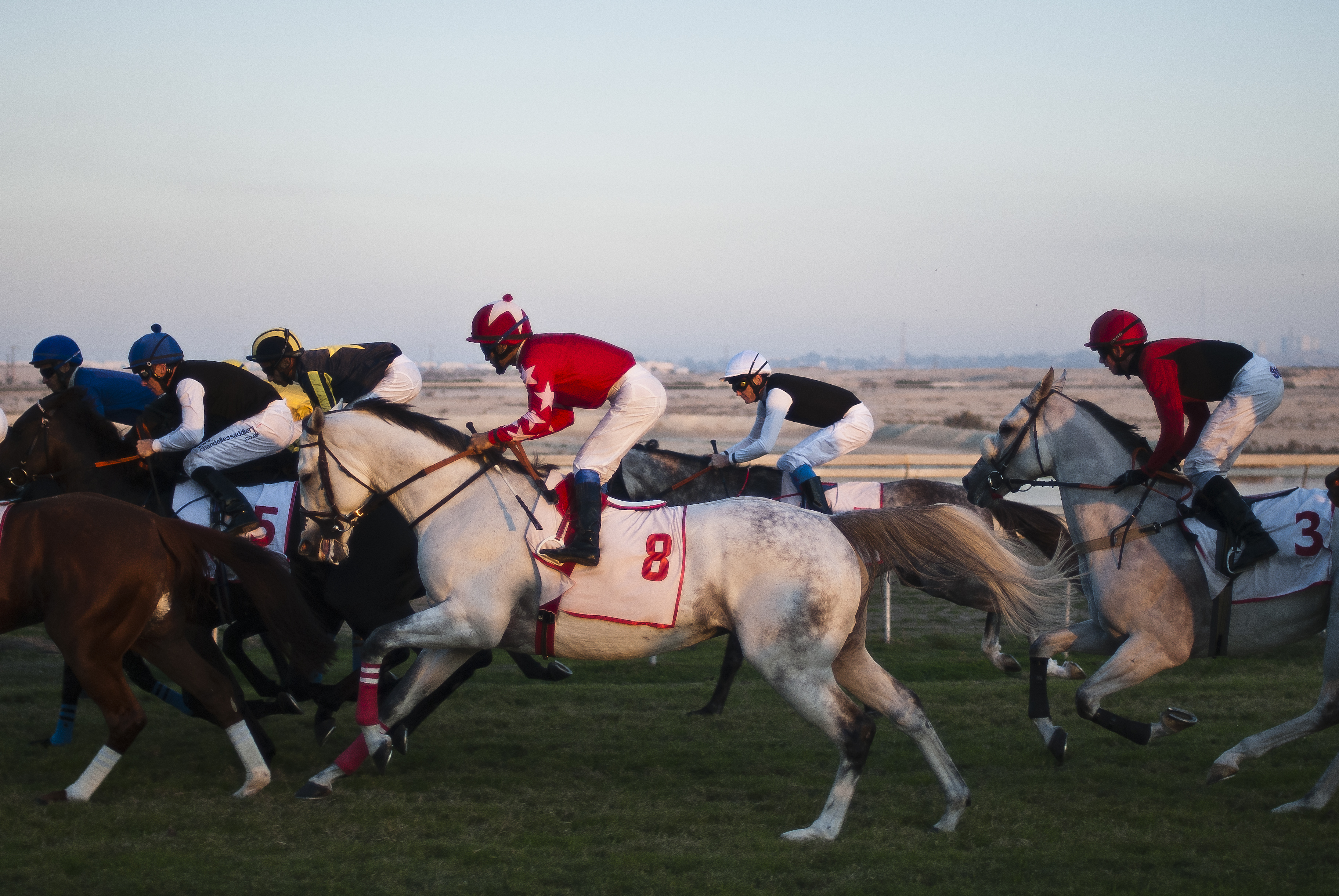 Taken in Sakhir, Bahrain.